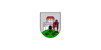 Vlag van Bjelovar.